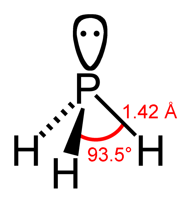 Phosphine